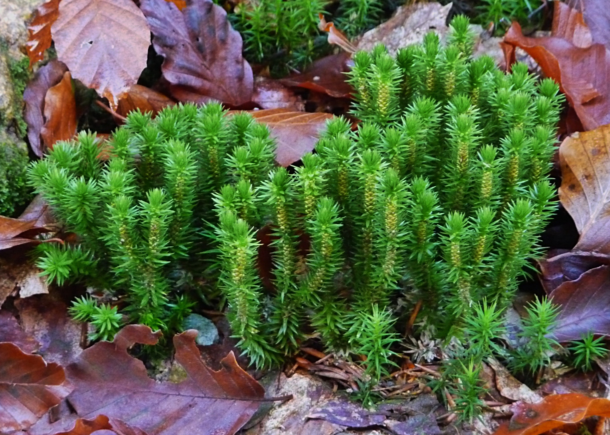 Tannen-Bärlapp bei Jungmaierhütte